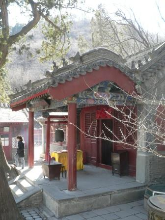 八大处龙王堂抱厦